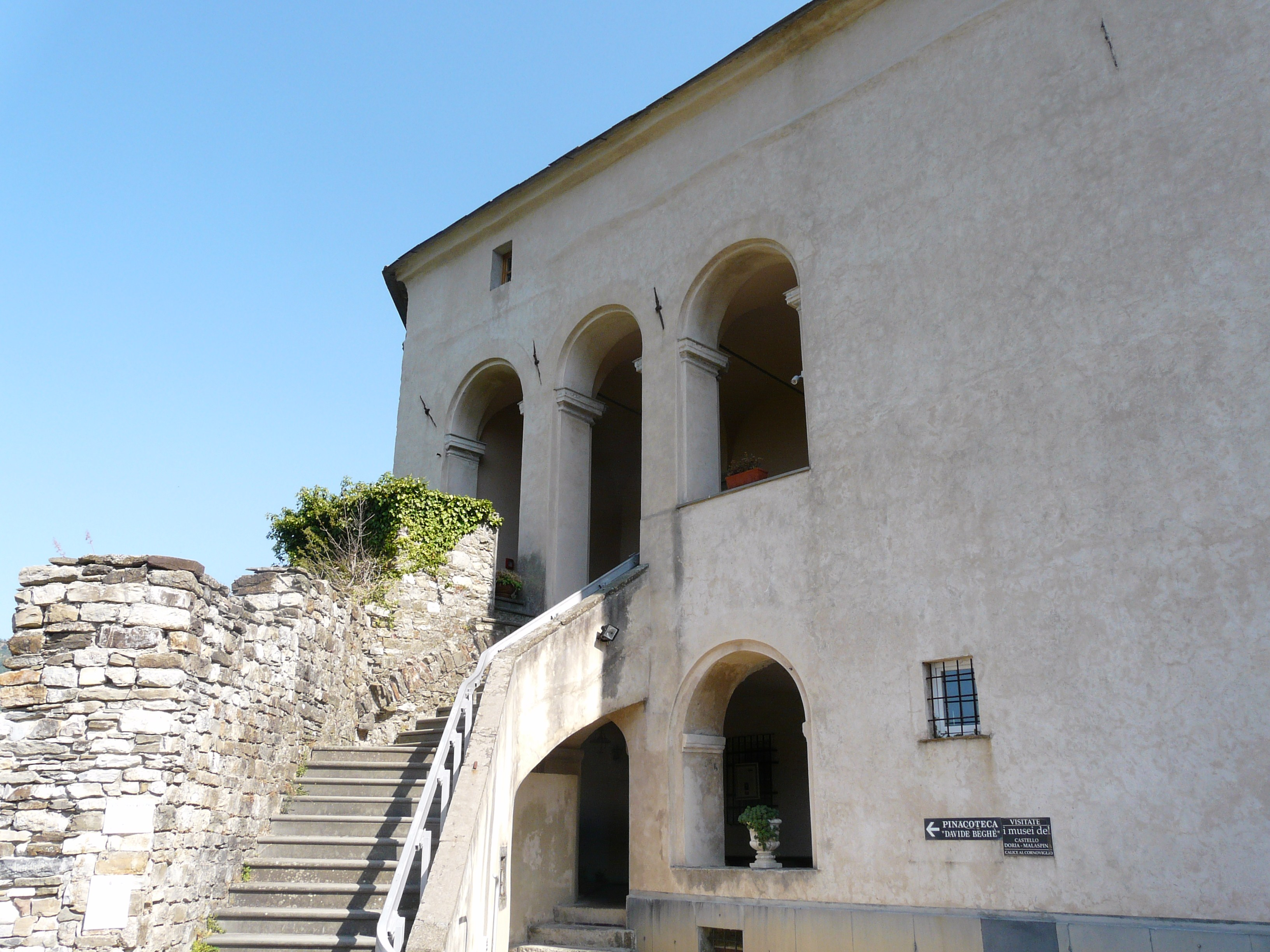 Castello Doria Malaspina, Calice al Cornoviglio, Liguria, Italia